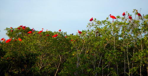 el corocoro, especie de ave que se encuentra en Venezuela en el Parque Nacional Morrocoy, come pequeños crustaceos.